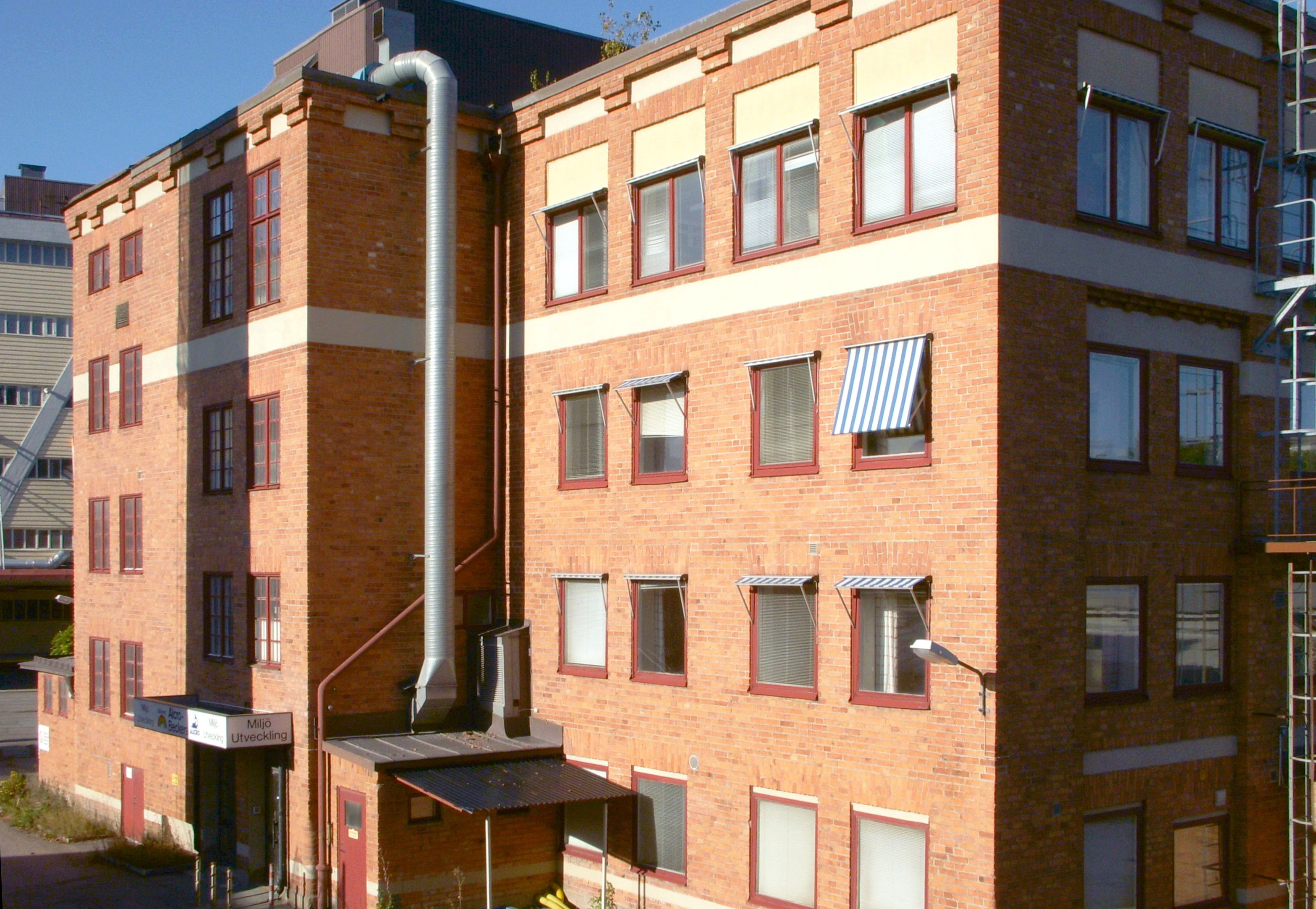 Förbandsfabriken på Lövholmen, Liljeholmen i Stockholm